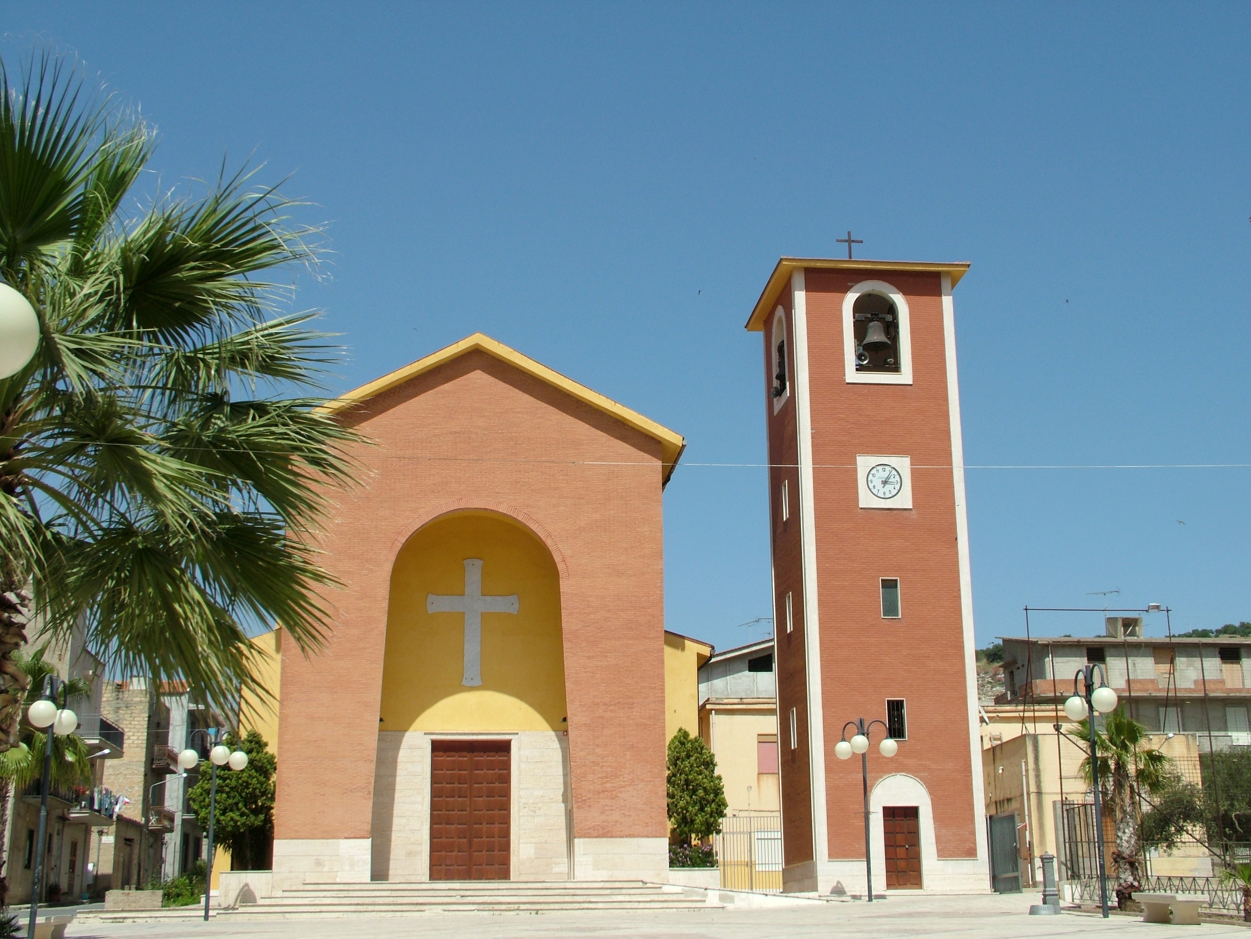 Montallegro, Provinz Agrigent, Sizilien, die Kirche